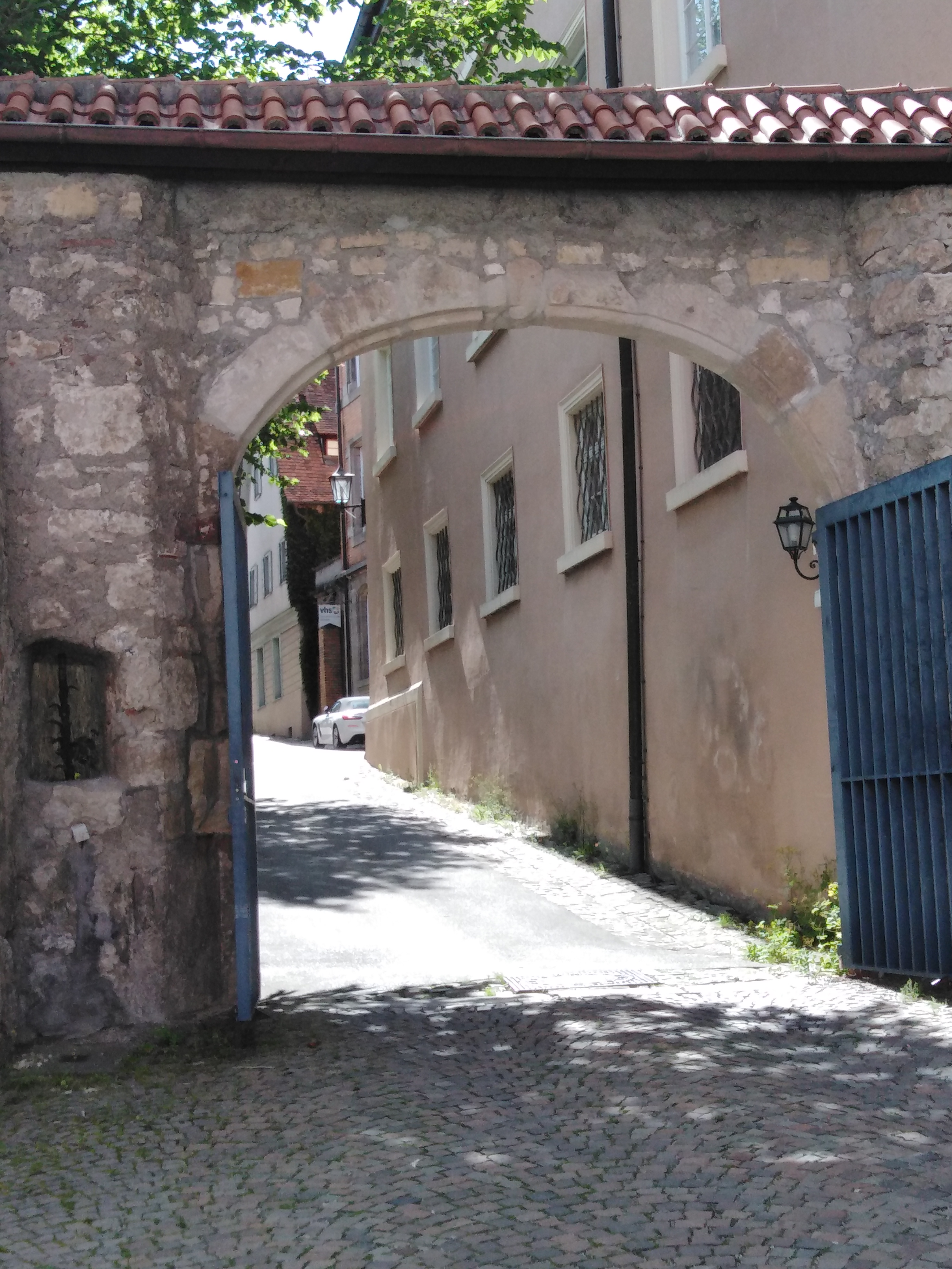 Toreinfahrt zum Gelände der ehem. Johanniterkommende Rottweil